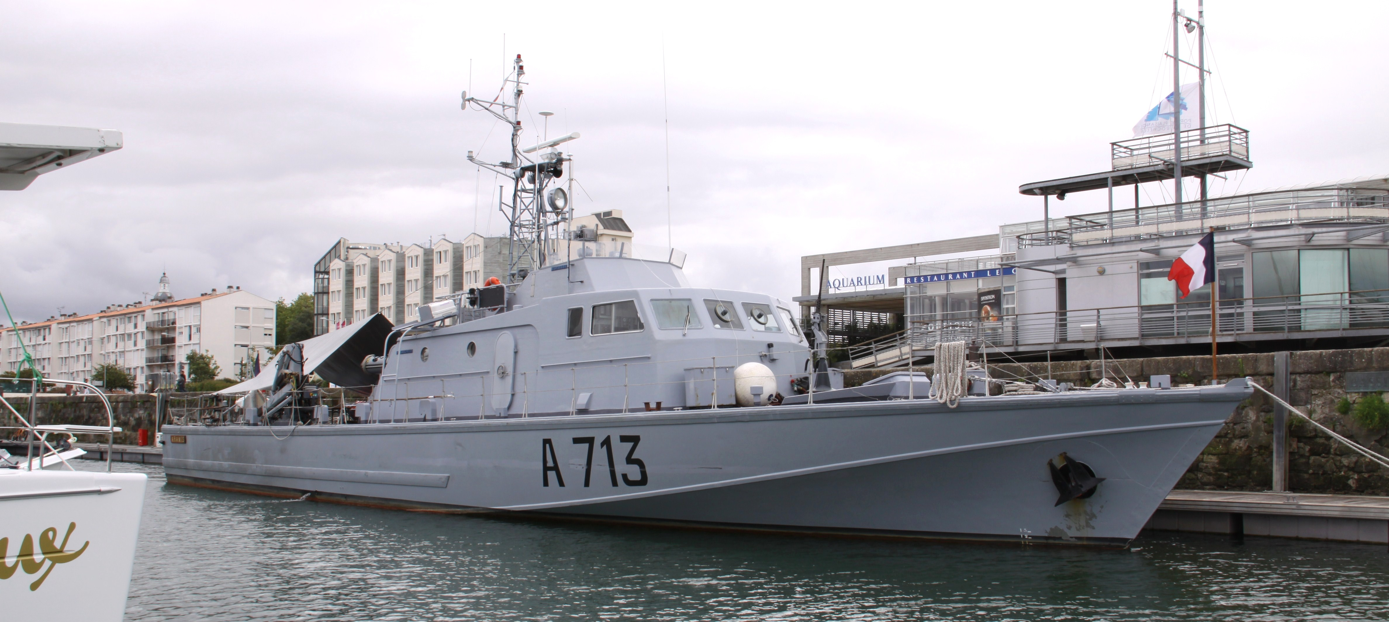 Le patrouilleur de la Marine Nationale française "Aramis" A 713 amarré dans le Bassin des Chalutiers du port de La Rochelle. L' "Aramis" est un patrouilleur de surveillance de sites (PSS). Il a été lancé en 1980. La Rochelle, Charente Maritime, France.